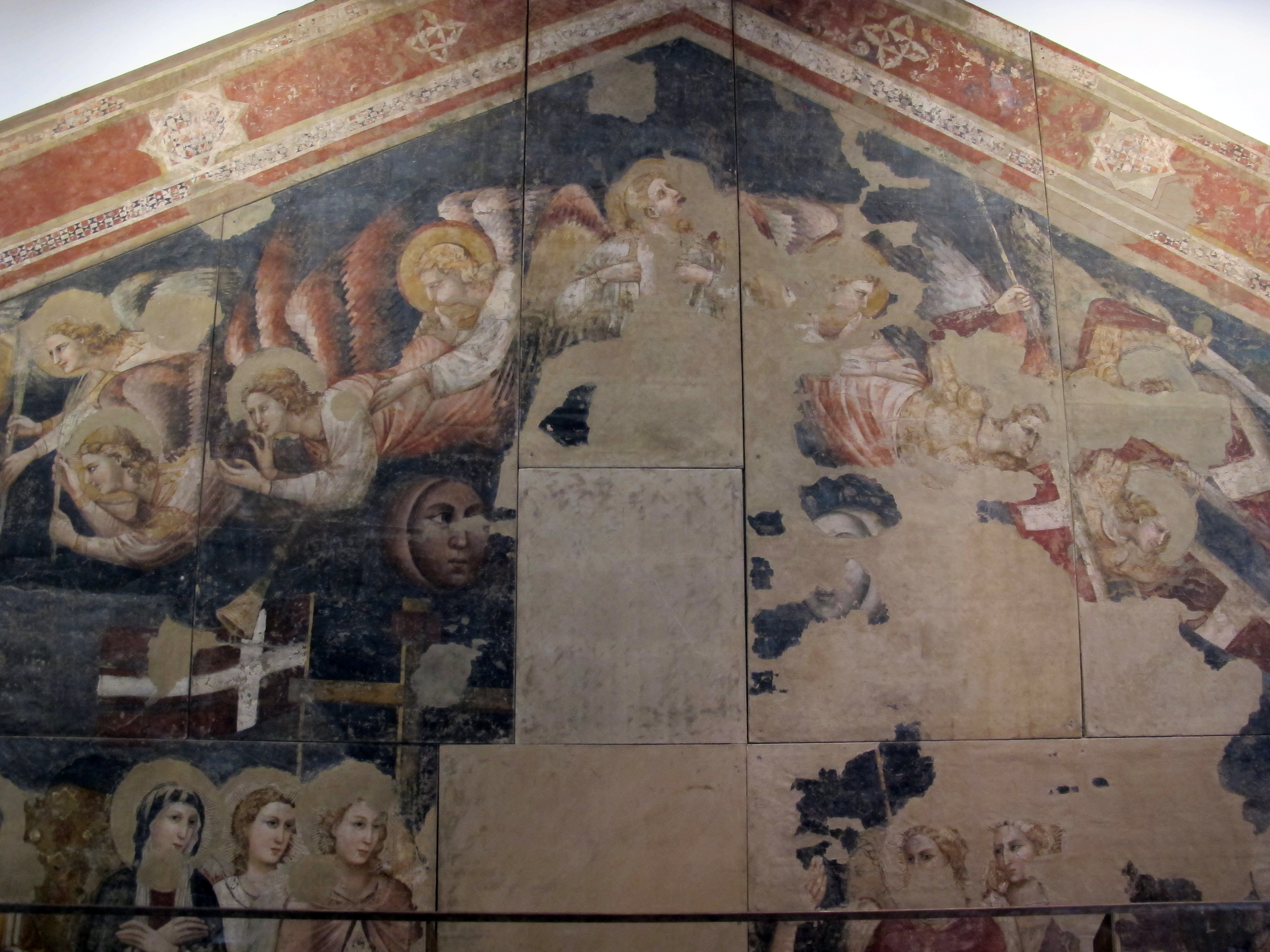 Scuola riminese, giudizio universale, da san giovanni evangelista (oggi sant'agostino) a rimini, 1310 ca.